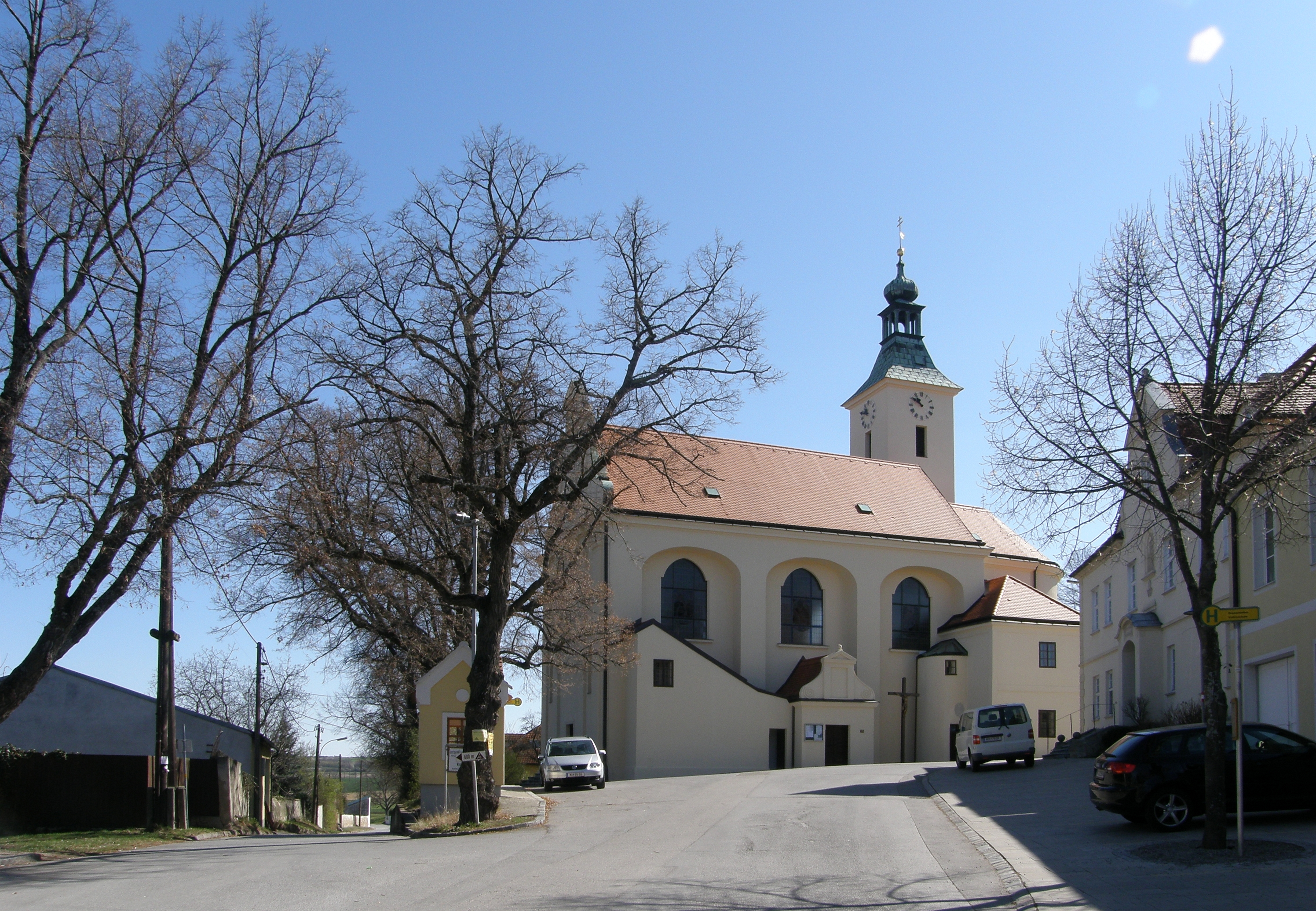 Kath. Pfarrkirche hl. Veit